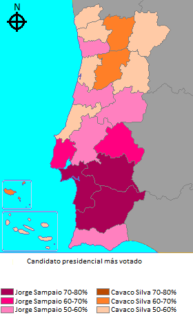 Resultados das eleições presidenciais de 1996